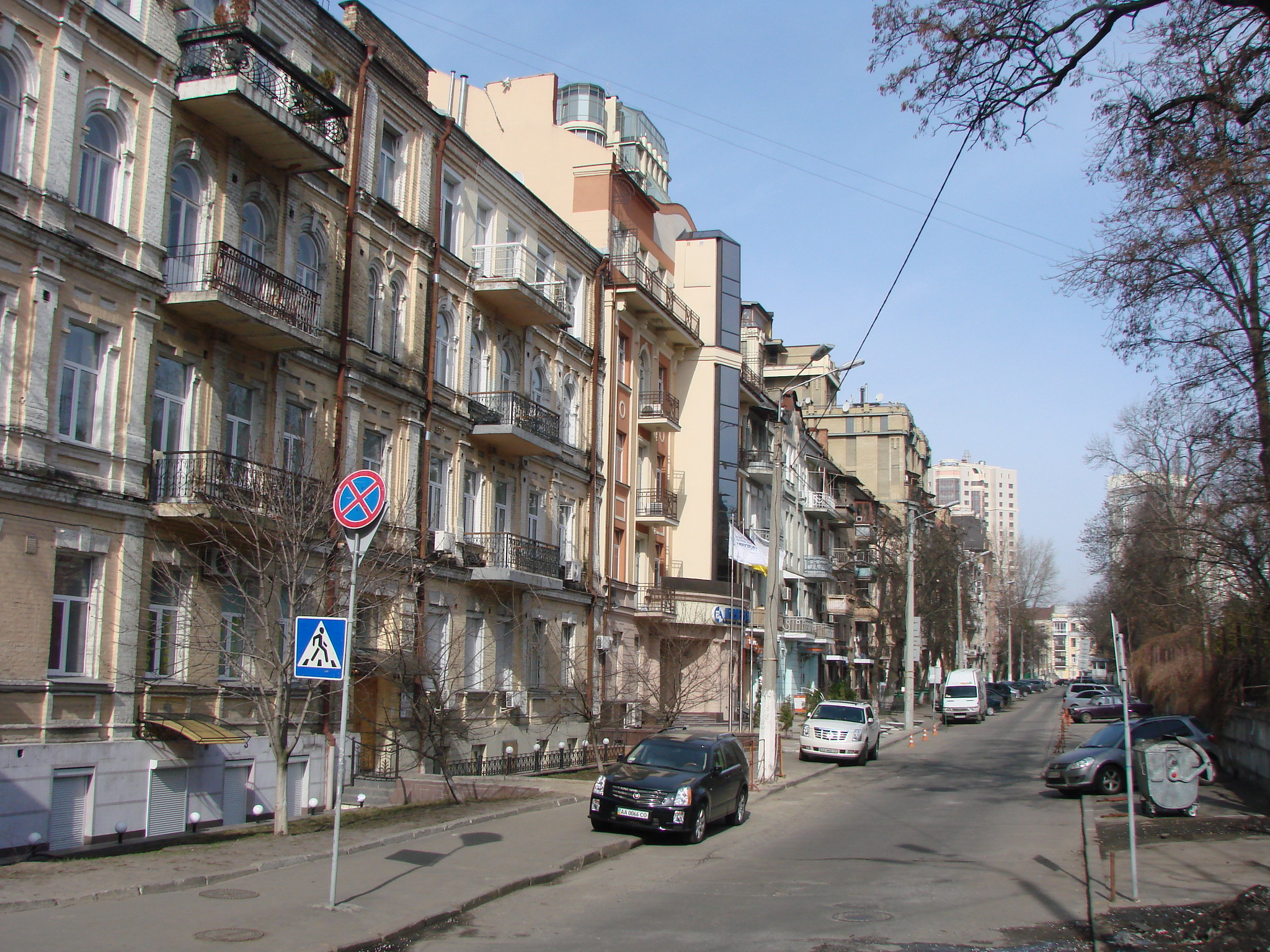 Вулиця Вєтрова у Києві